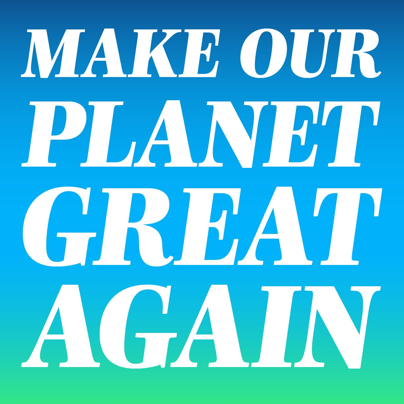 Logo de l'initiative Make our planet great again.